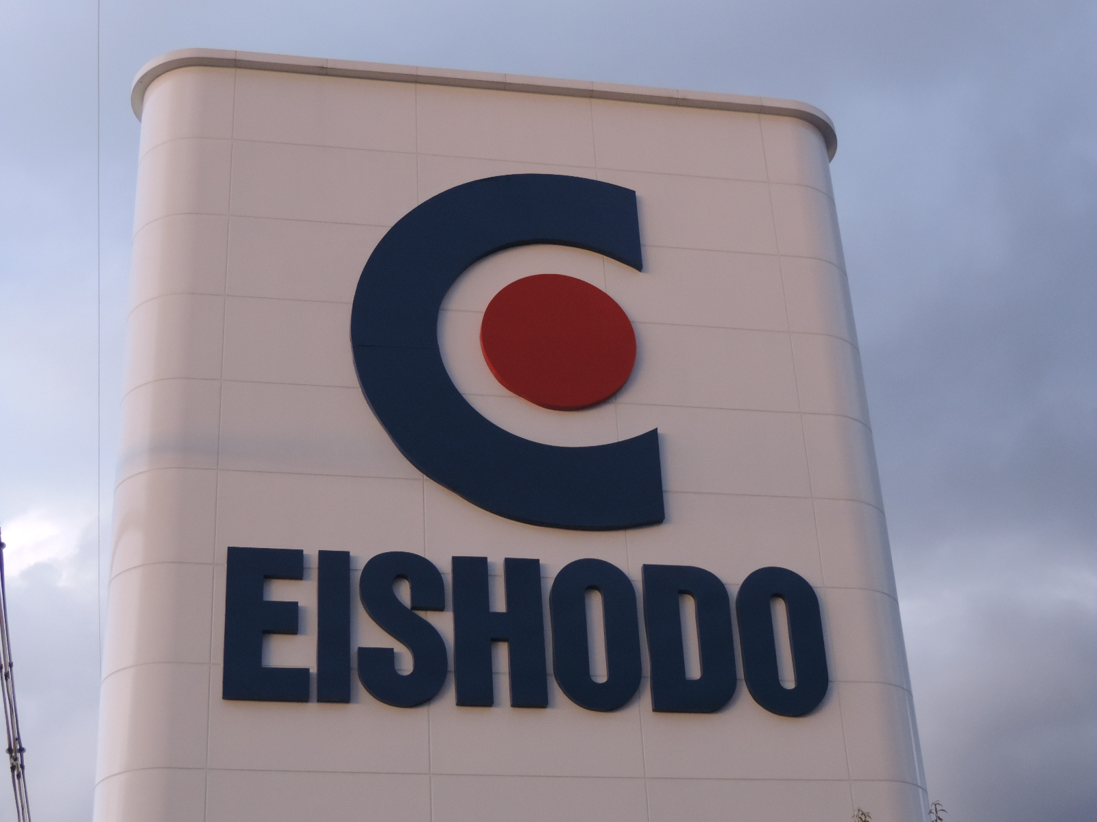 永昌堂印刷ロゴマーク（滋賀県彦根市：2017年撮影）